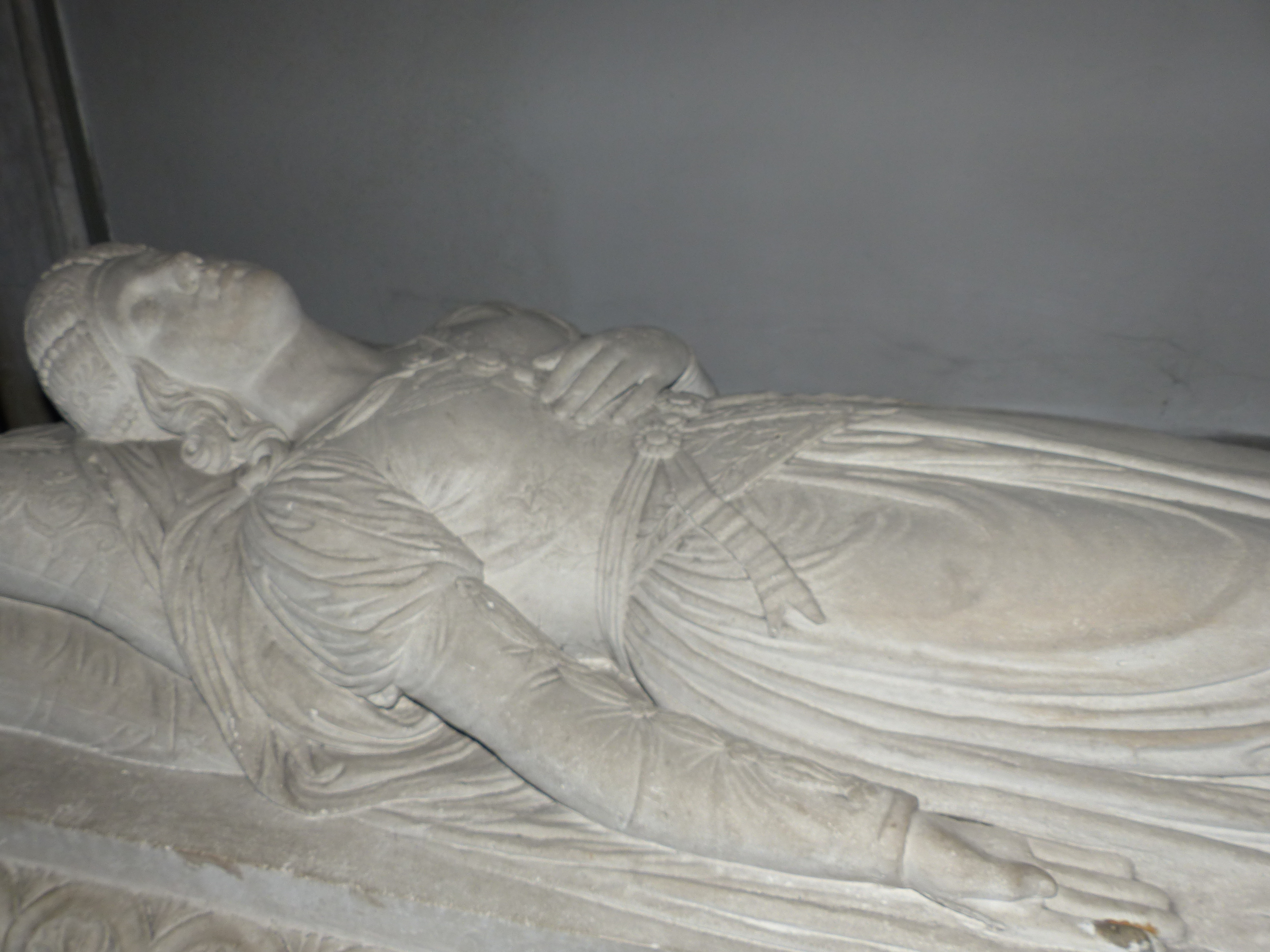 Cénotaphe de Clémence de Zähringen à l'abbaye d'Hautecombe